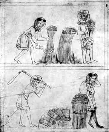 Velislavova bible - Svaty Vaclav na poli